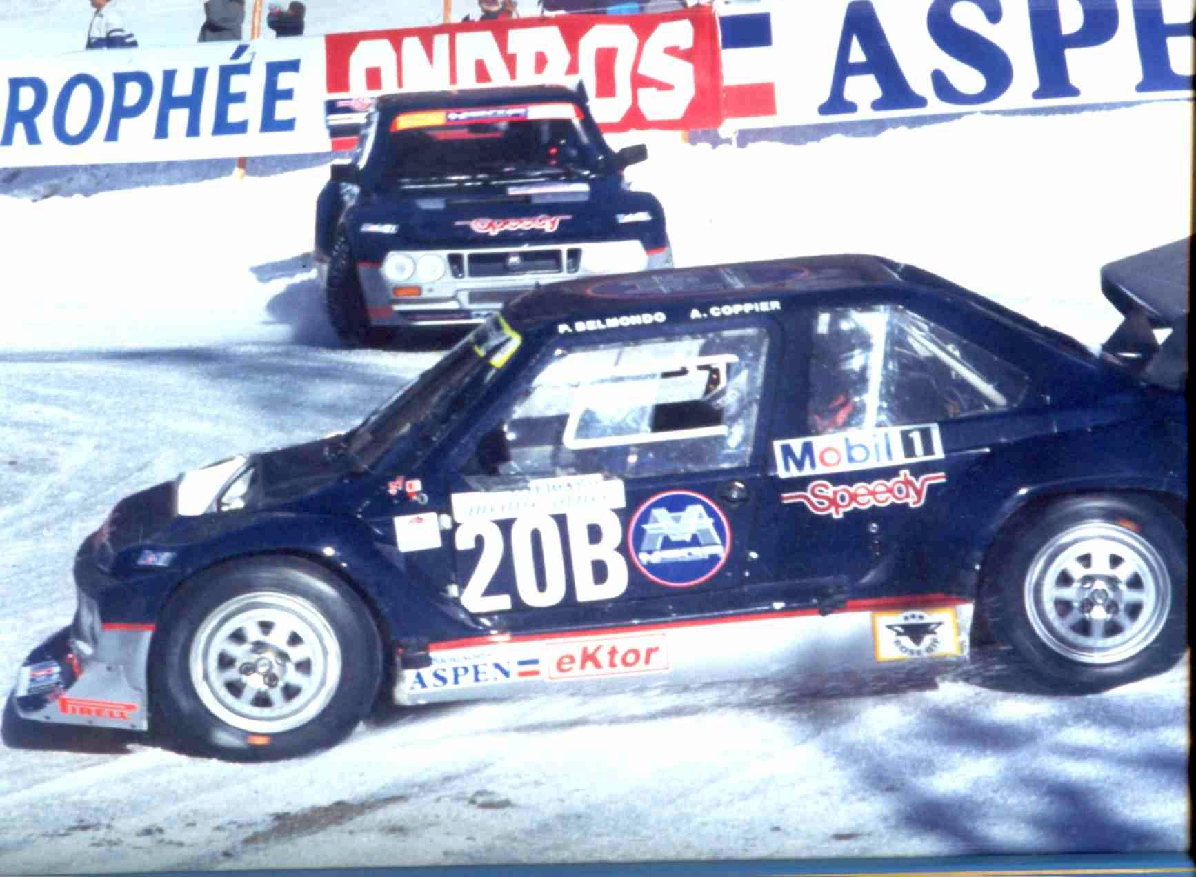 Devant Bernard Darniche.